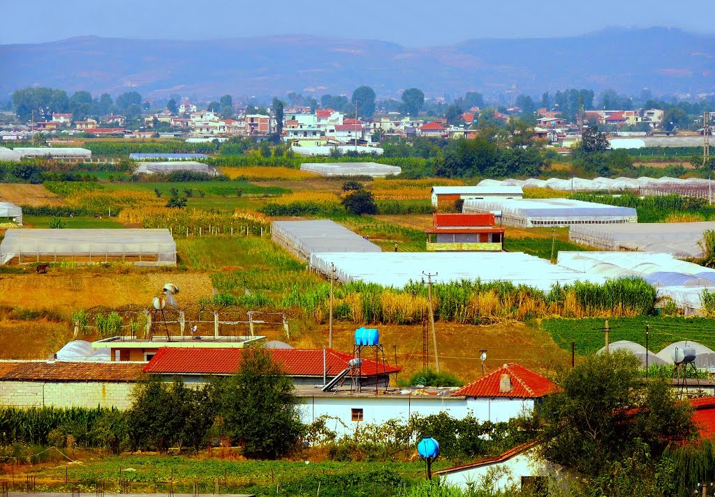 Shqip